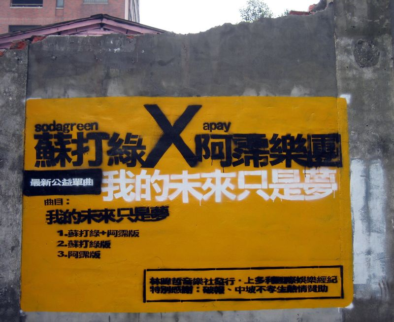 中文（台灣）: 臺北市大安區敦南街（原基隆路三段4巷）「效忠領袖、我愛總統」塗鴉事件，反諷民主進步黨執政不如人意，也反諷台灣北社大力支持陳水扁。「蘇打綠╳阿霈樂團，我的未來只是夢」為現場塗鴉之一。2017年5月30日，前民主進步黨文宣部主任陳芳明、東吳大學教授陳瑤華、國立陽明大學教授黃嵩立、國立東華大學教授施正鋒、作家朱天衣等人公開聲援原住民族轉型正義小教室在凱達格蘭大道紮營抗議行動，陳芳明承認，蔡英文政府的轉型正義已經偏離軌道，民主進步黨的理念與作法背離解嚴目標越來越遠，下星期他將過70歲生日，但他不敢許下生日願望，「因為願望早已幻滅」。